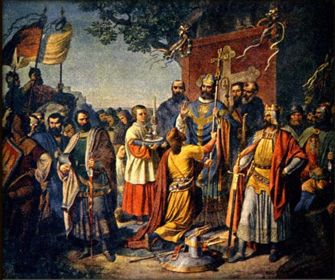 Antonín Lhota (1812-1905) - Král Přemysl Otakar II. roku 1254 v Prusku